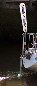 Windfahnen-Selbststeueranlage für kleine und mittlere Segelboote, engl: Selfsteering windvane for sailing vessels